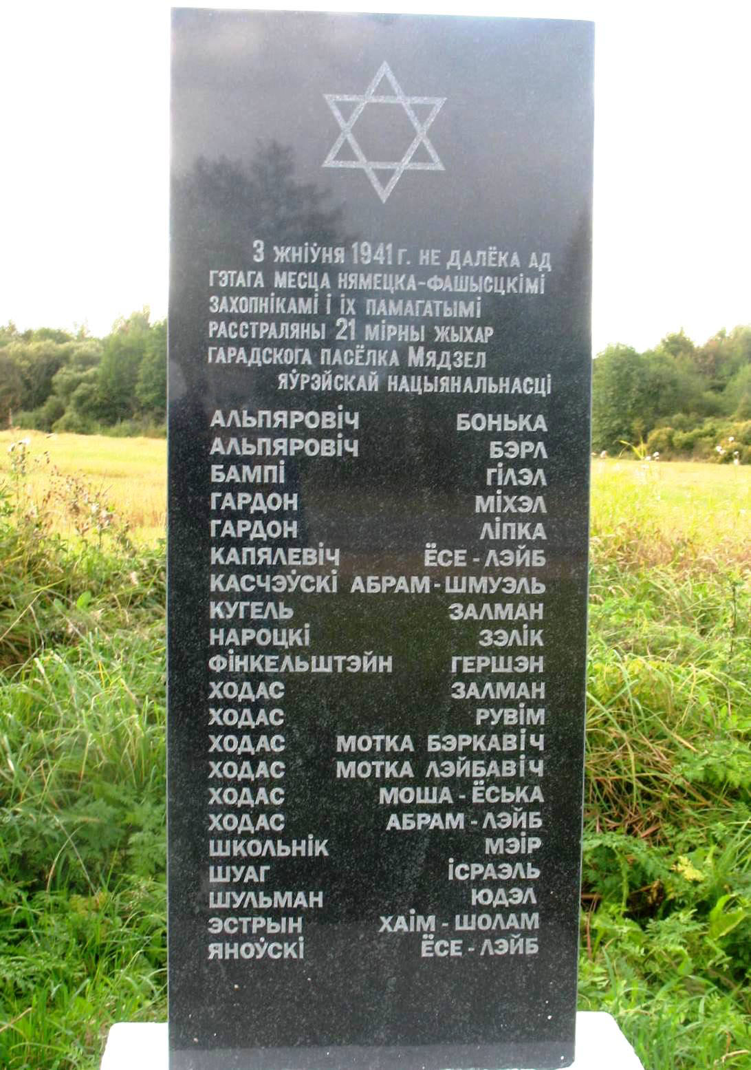 Памятник евреям города Мядель Минской области, убитым в сентябре 1941 года в урочище Мхи. Находится у дороги Минск-Нарочь за 200 метров до знака «Мядзель» с левой стороны дороги. Установлен израильтянами - потомками убитых.